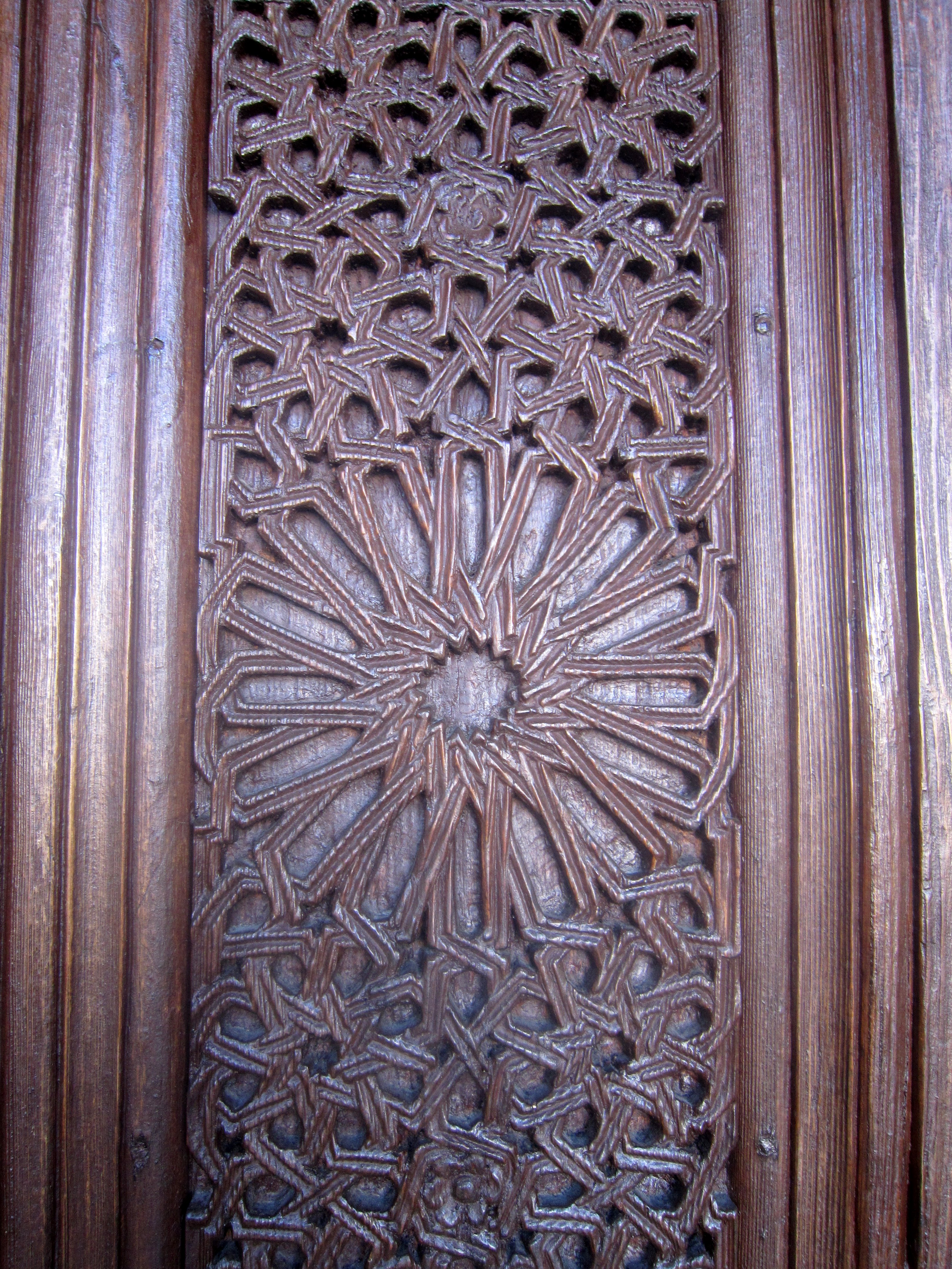 Panneau de boiserie orné d'arabesques et d'entrelacs dans la Grande Mosquée de Kairouan, en Tunisie.